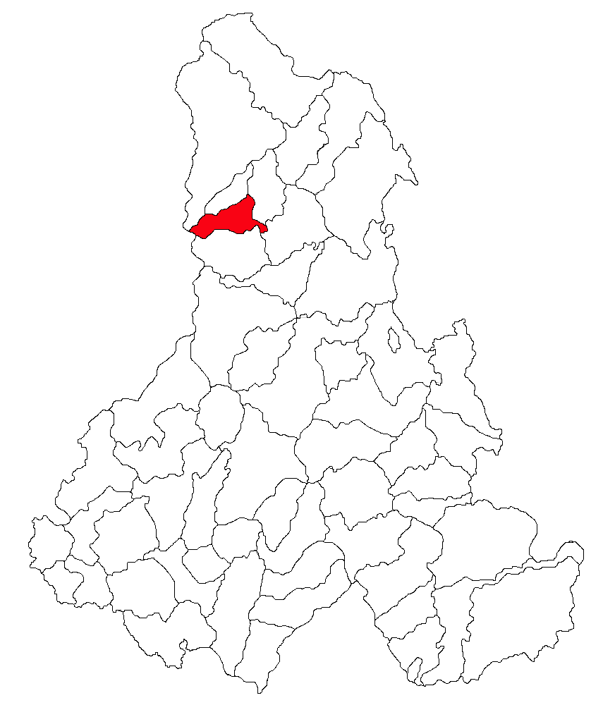 Categorie:Hărţi ale judeţului Harghita Contents 1 Licensing 2 Sursă 3 Licensing 4 Original upload log Licensing Sursă ro::Imagine:Harta_jud_Harghita.png